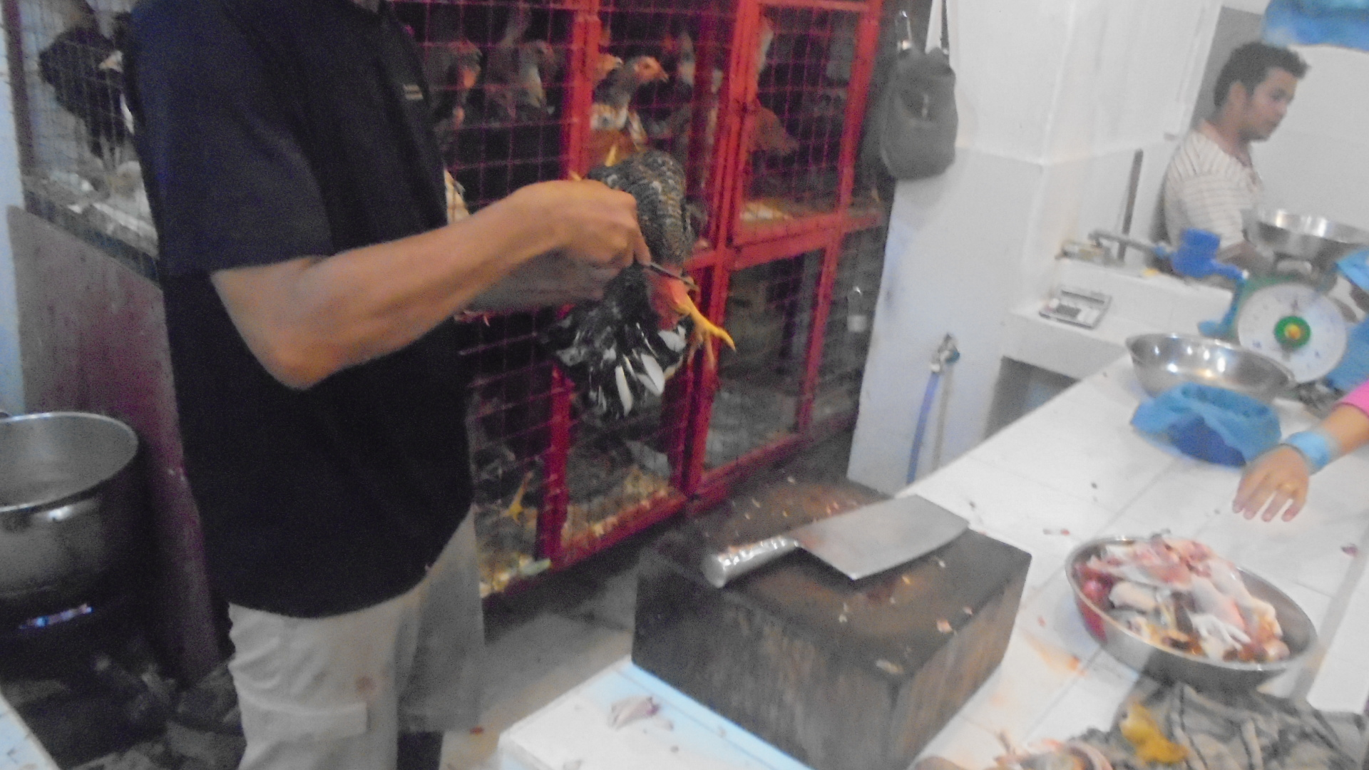 インドネシアの市場で鳥をさばいているところ